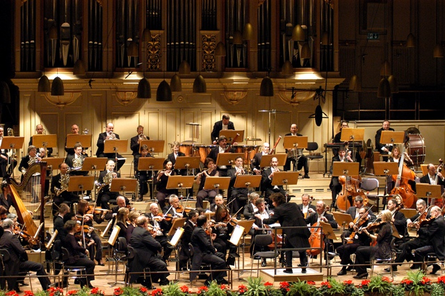 Die Neue Philharmonie Westfalen während eines Konzerts in der Tonhalle Zürich